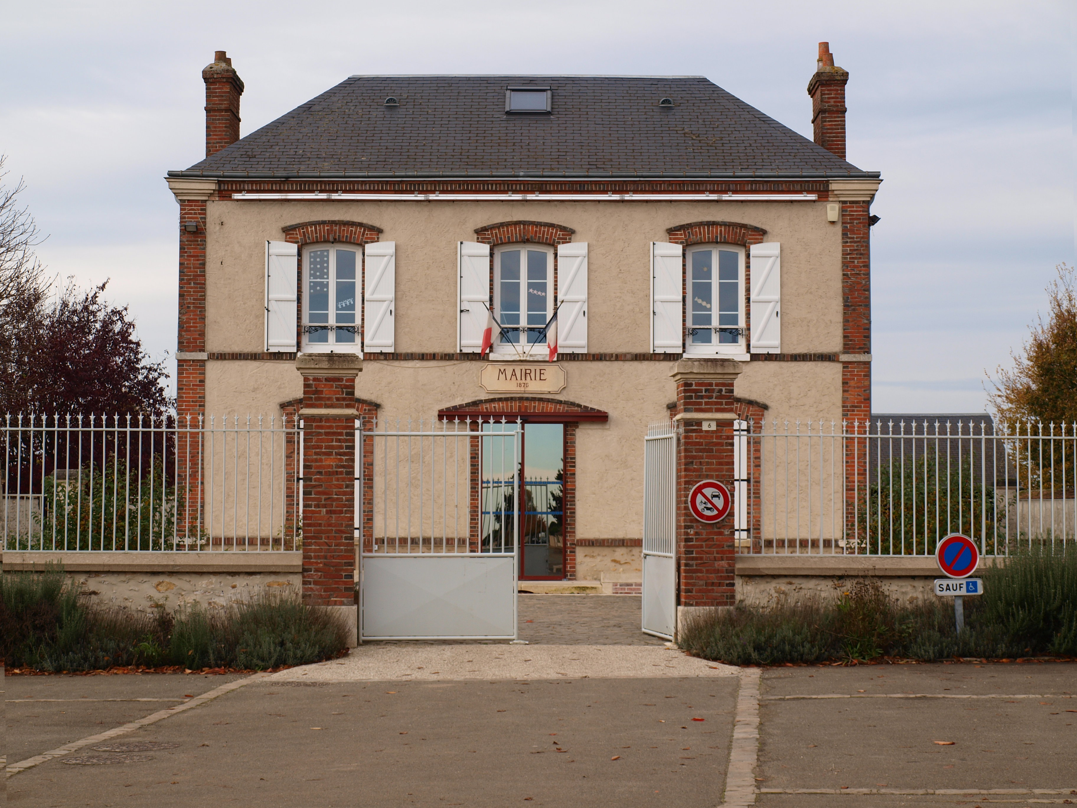 Garancières-en-Beauce (Eure-et-Loir, France) ; mairie